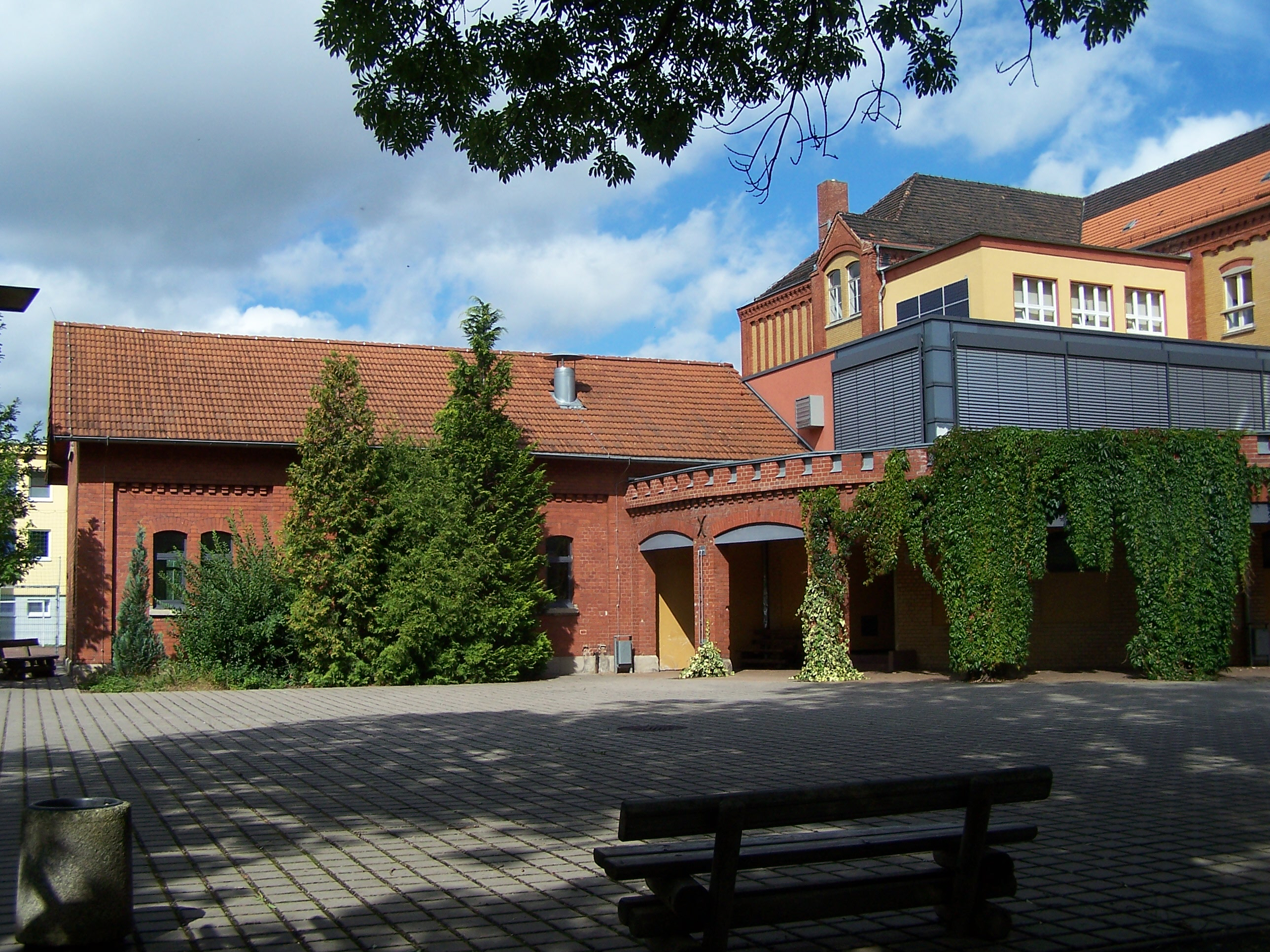 Nebengebäude und Schulhof. In den letzten Jahren wurde viel Geld für die technische Modernisierung der über 100 Jahre alten Schule investiert.